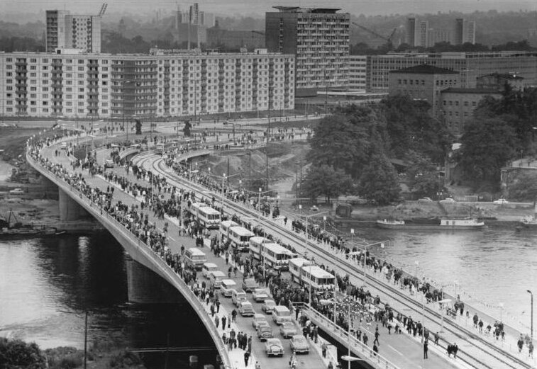 Dresden, Rudolf-Friedrichs-Brücke ADN-ZB Häßler 4.7.1971-B-Dresden: Dr.-Rudolf-Friedrichs-Brücke dem Verkehr übergeben-Als achte Elbbrücke Dresdens wurde am 3.7.1971 die "Dr.-Rudolf-Friedrichs-Brücke" dem Verkehr übergeben. Damit erfüllten die Brücken- und Straßenbauer der Elbestadt eine wichtige Verpflichtung zum VIII. Parteitag der SED und schlossen das letzte Bindeglied in der für den Verkehr überaus wichtigen Nord-Süd-Verbindung durch Dresden.